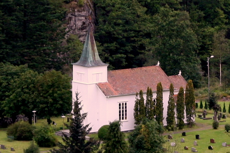 Åna-Sira kirke